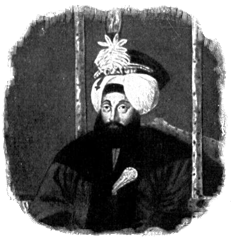 Mahmud II (1785-1839)